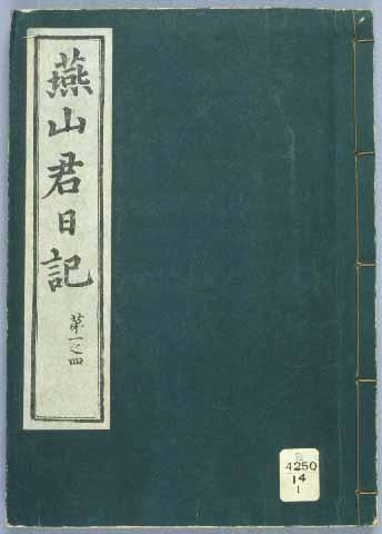 Daily record Yeonsangun of Joseon, cover of volume one part four.